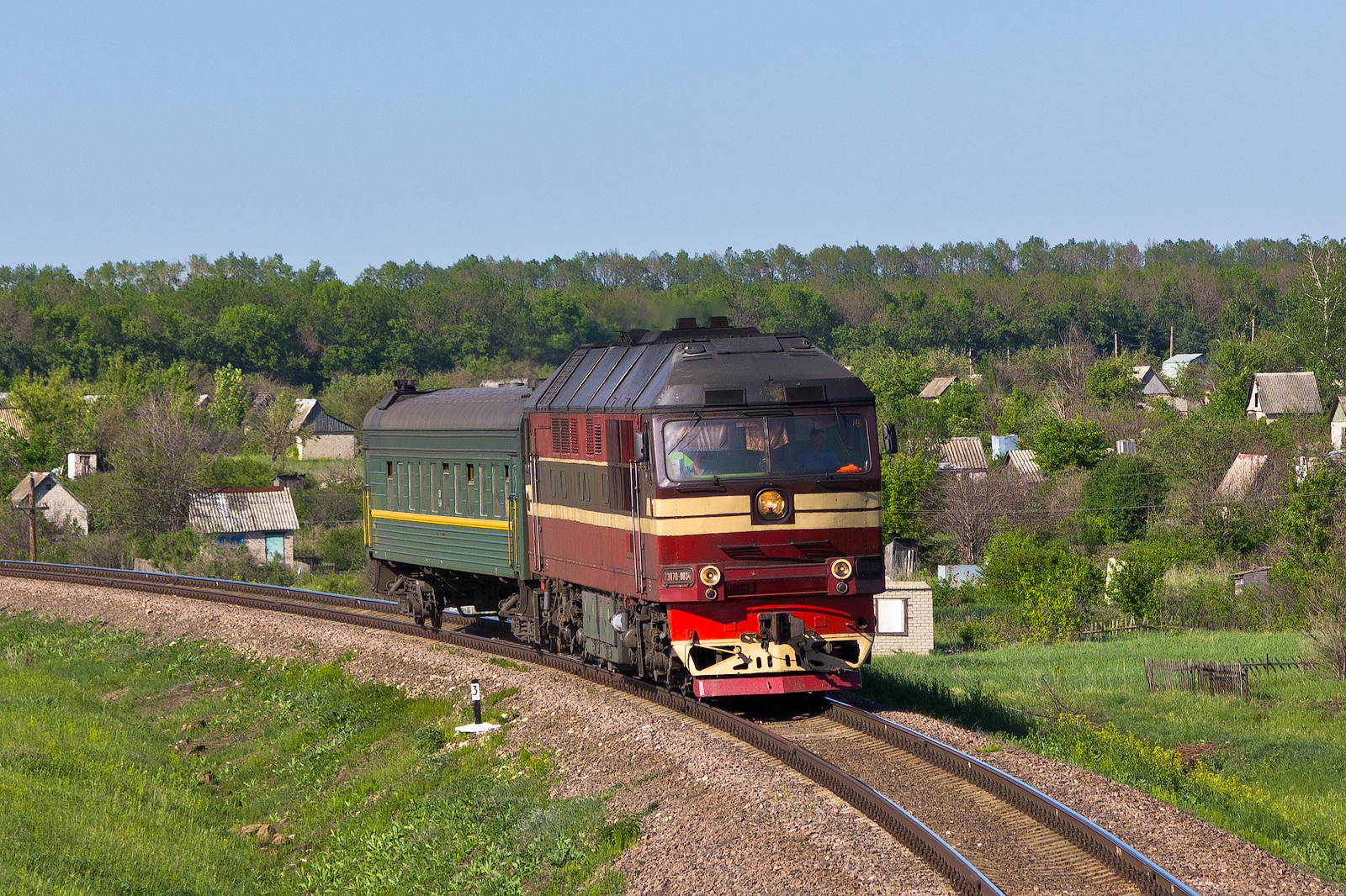 С пригородным поездом Лев Толстой - Елец, перегон Лев Толстой - Лебедянь. Этот же поезд курсировал 3 раза в неделю по маршруту: Лев Толстой - Данков - Куликово поле (Куркино) до отмены маршрута в феврале 2014 года.